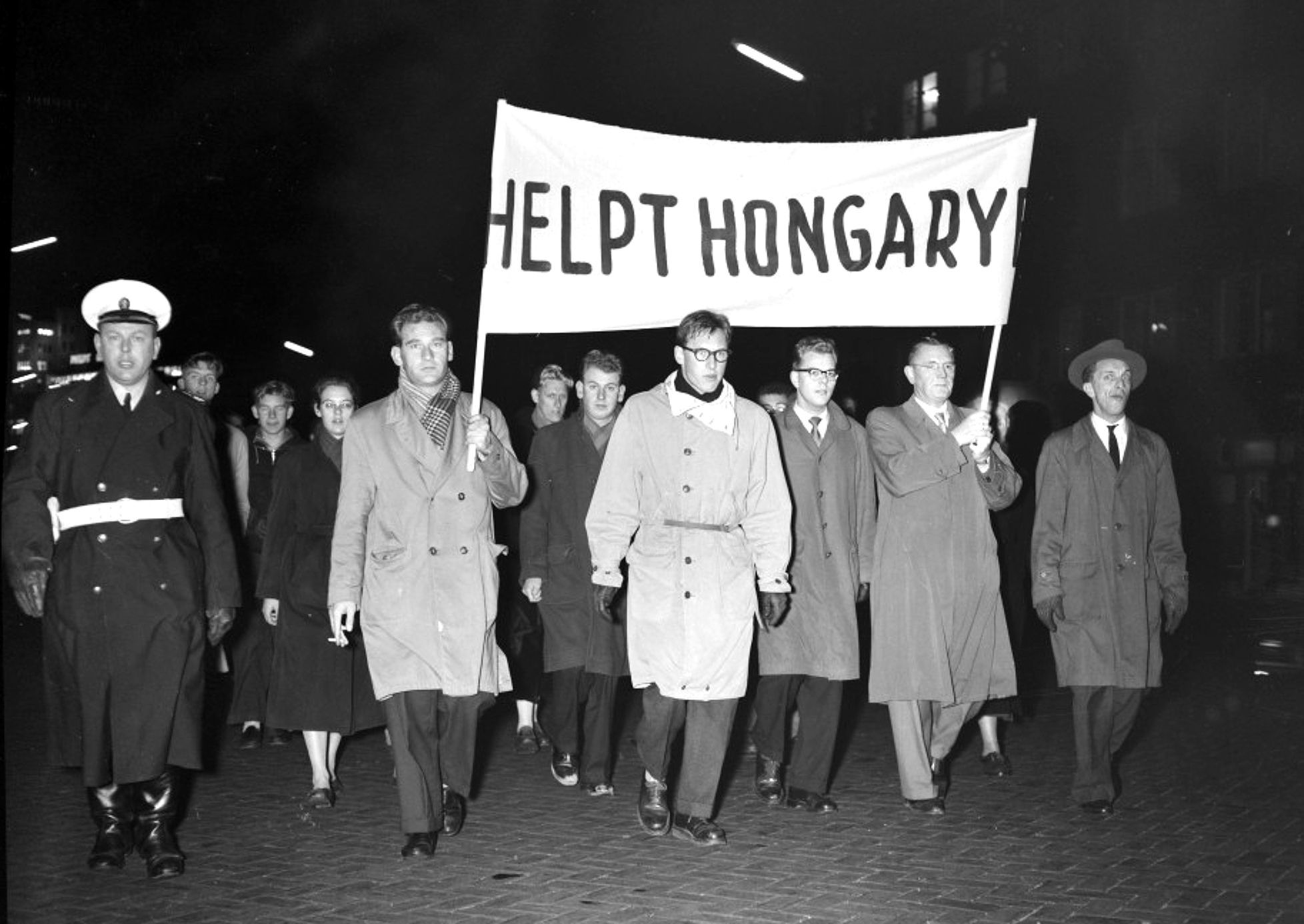 Herdenkingsavond Eindhoven, n.a.v. Hongaarse Opstand. Spandoek "Helpt Hongarije"